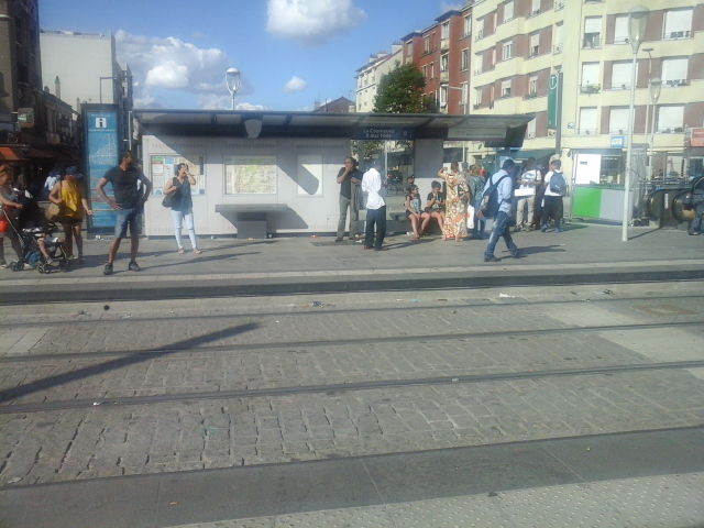 Station La Courneuve - 8 mai 1945 du tramway T1, après rénovation.